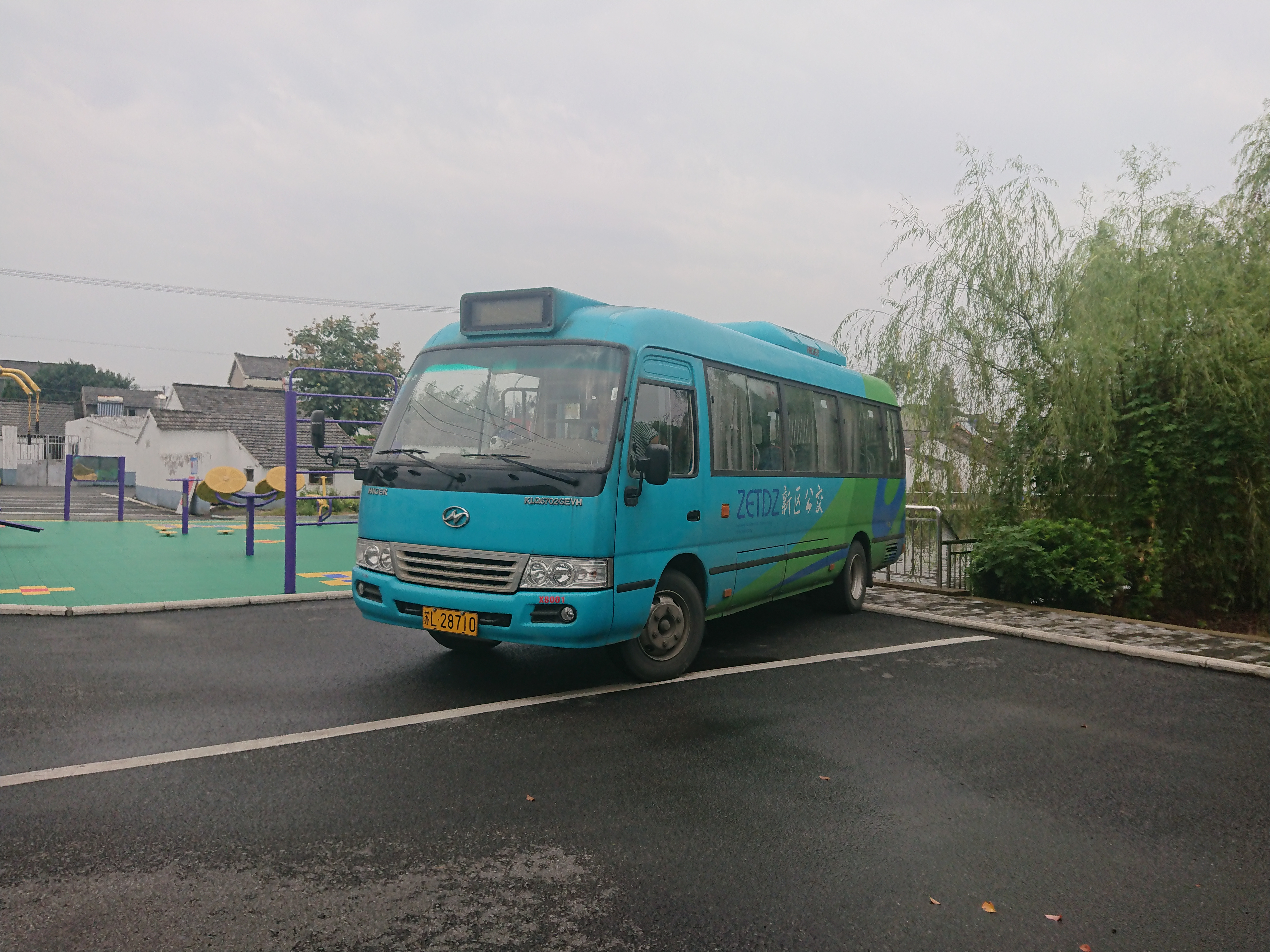 停靠在丁岗留村大丁家的镇江新区公交海格 KLQ6702GEVH ，运营线路新K101，自编号X8001，该车型首车。